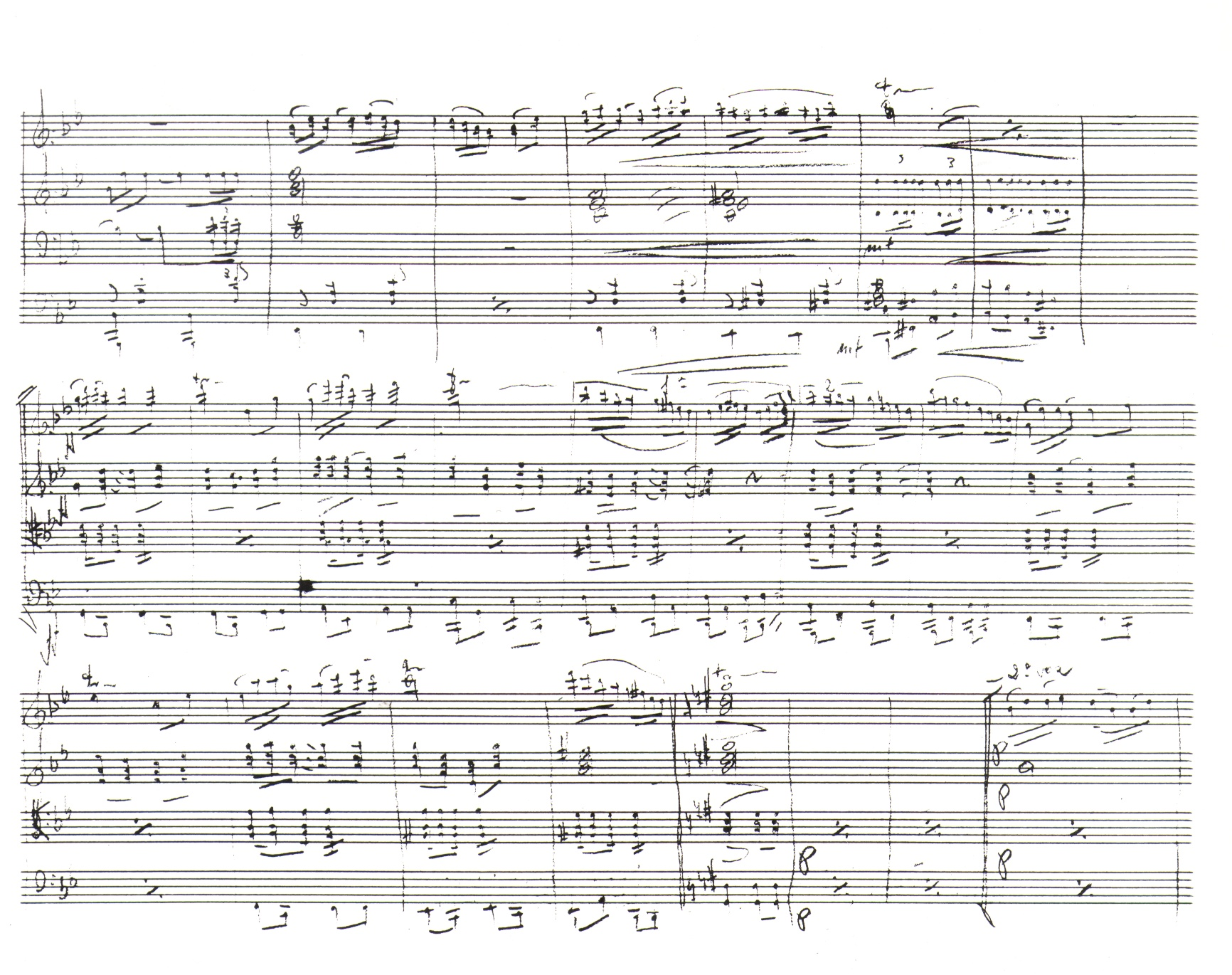 Partitura manuscrita de la marcha mora Sauditas. Autor: José María Ferrero Pastor.